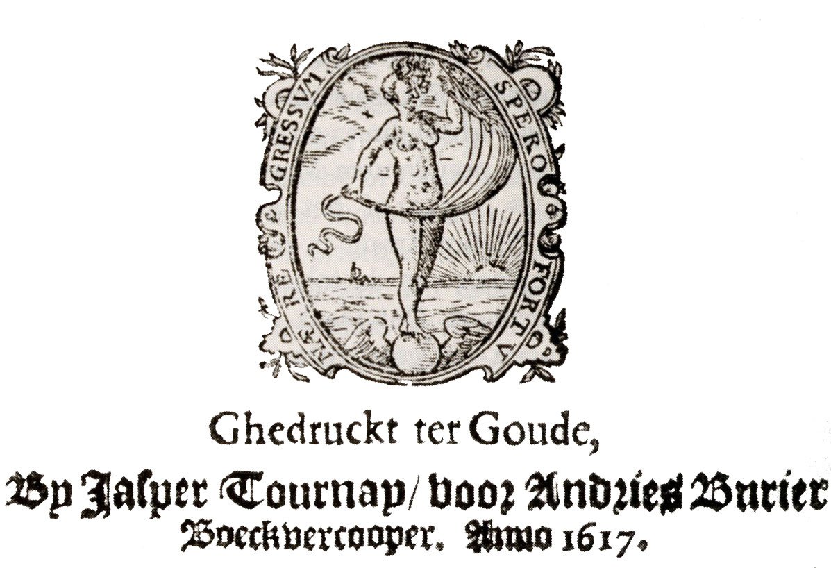 Drukkersmerk van Jasper Tournay (±1561-1635)